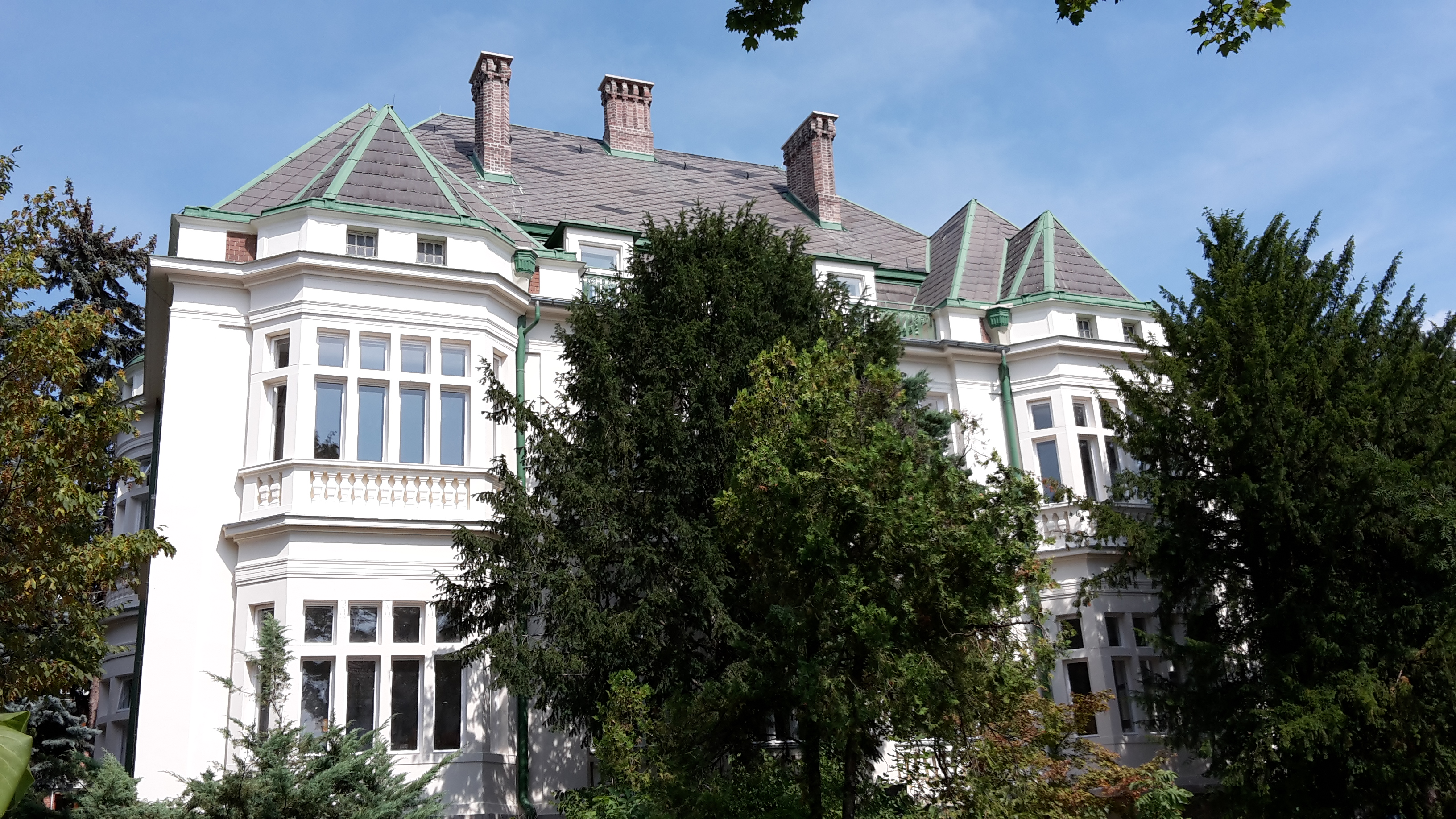 Ansicht des Schulgebäudes von der Linzer Straße